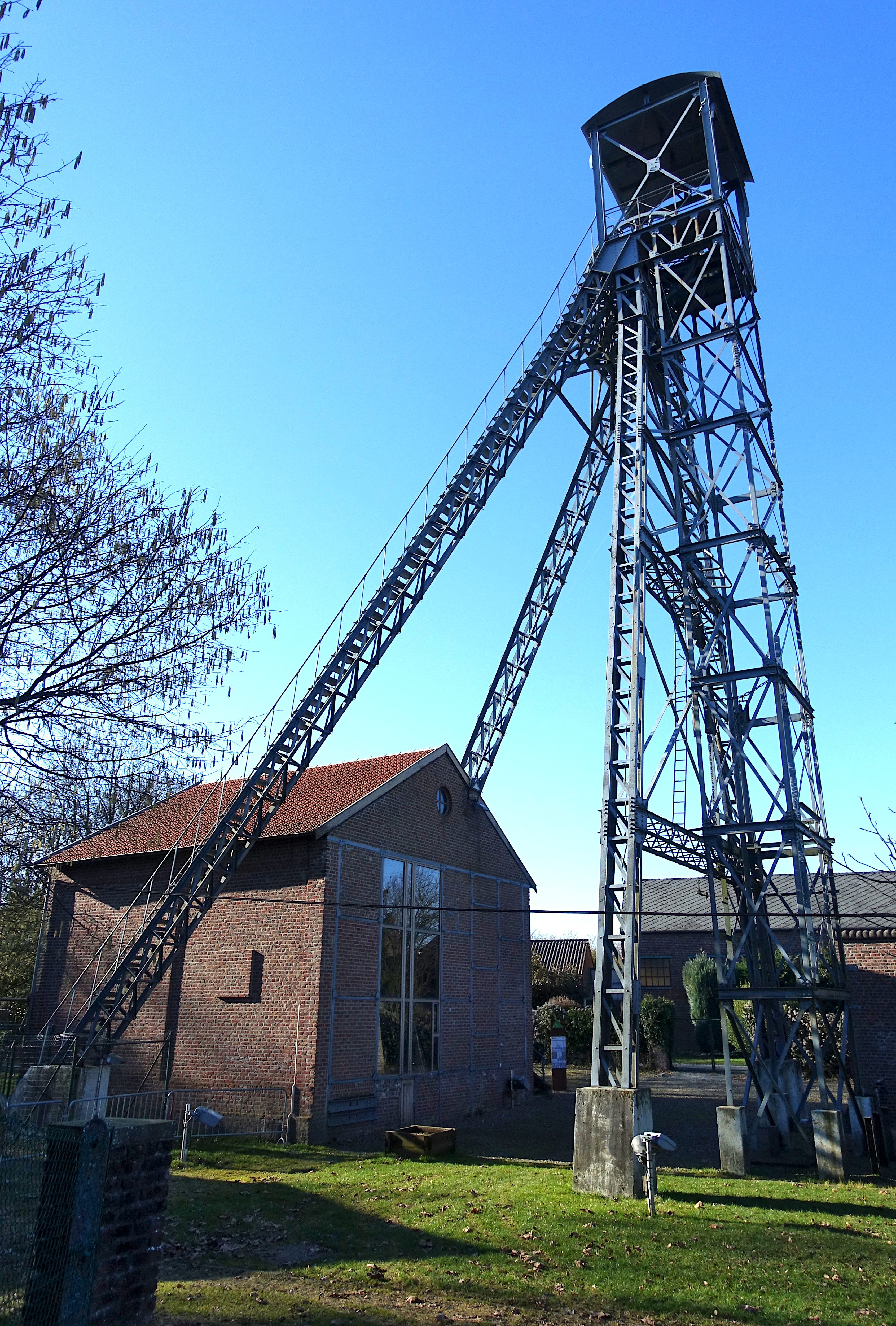 Metalen schachttoren van de koolmijn van Bas-Bois in Soumagne en gebouw met ophaalmachine